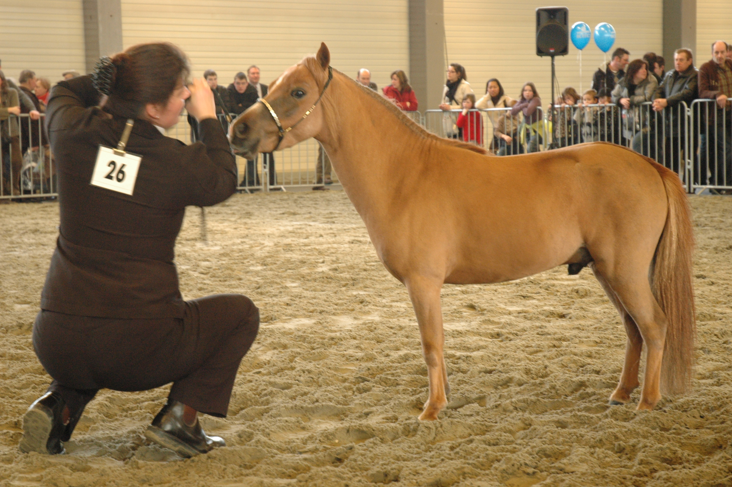 Miniatuurpaardjes prijskamp - Agriflanders 2009